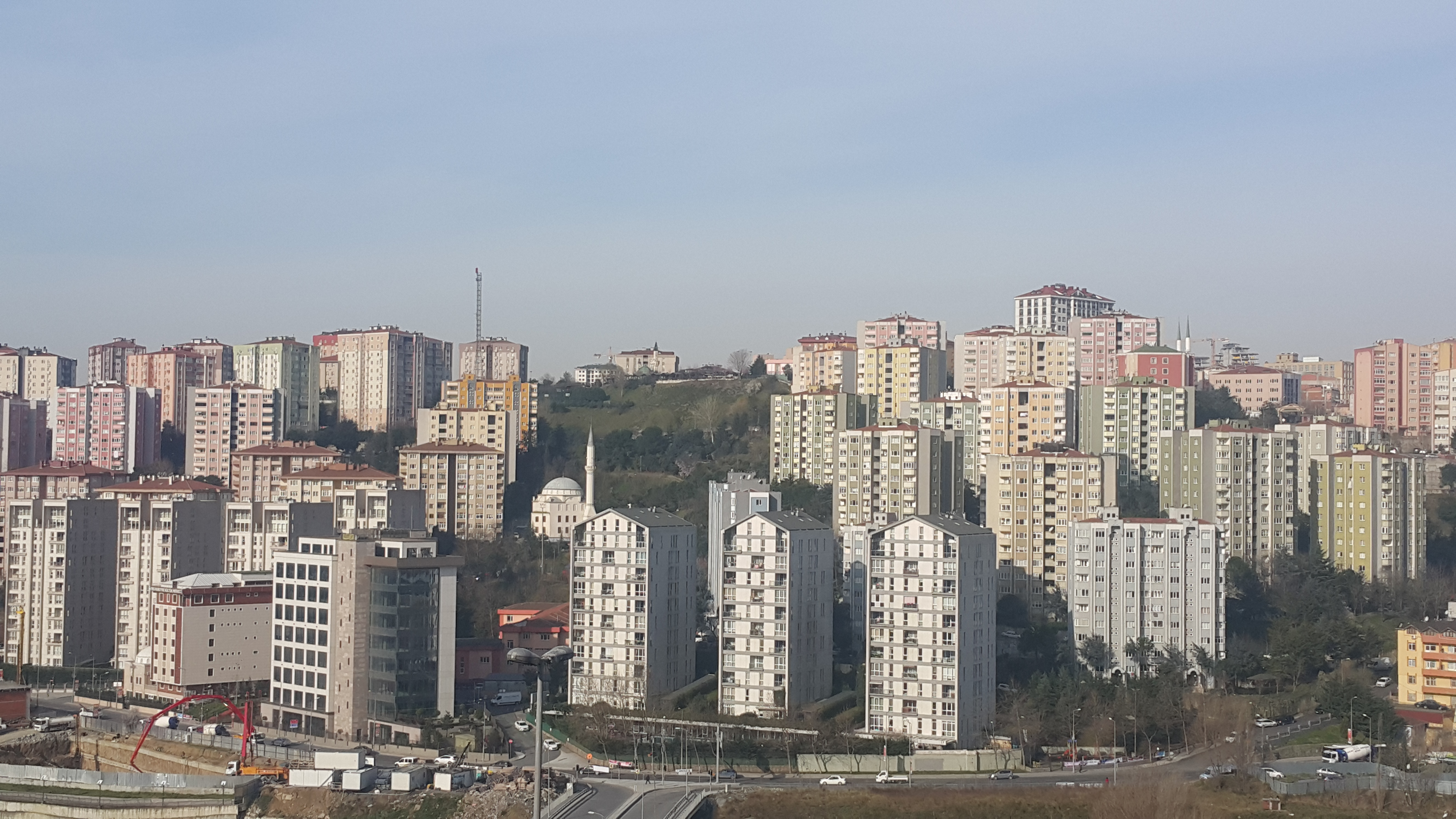 Kağıthane'den bir görünüş, İstanbul, Türkiye.